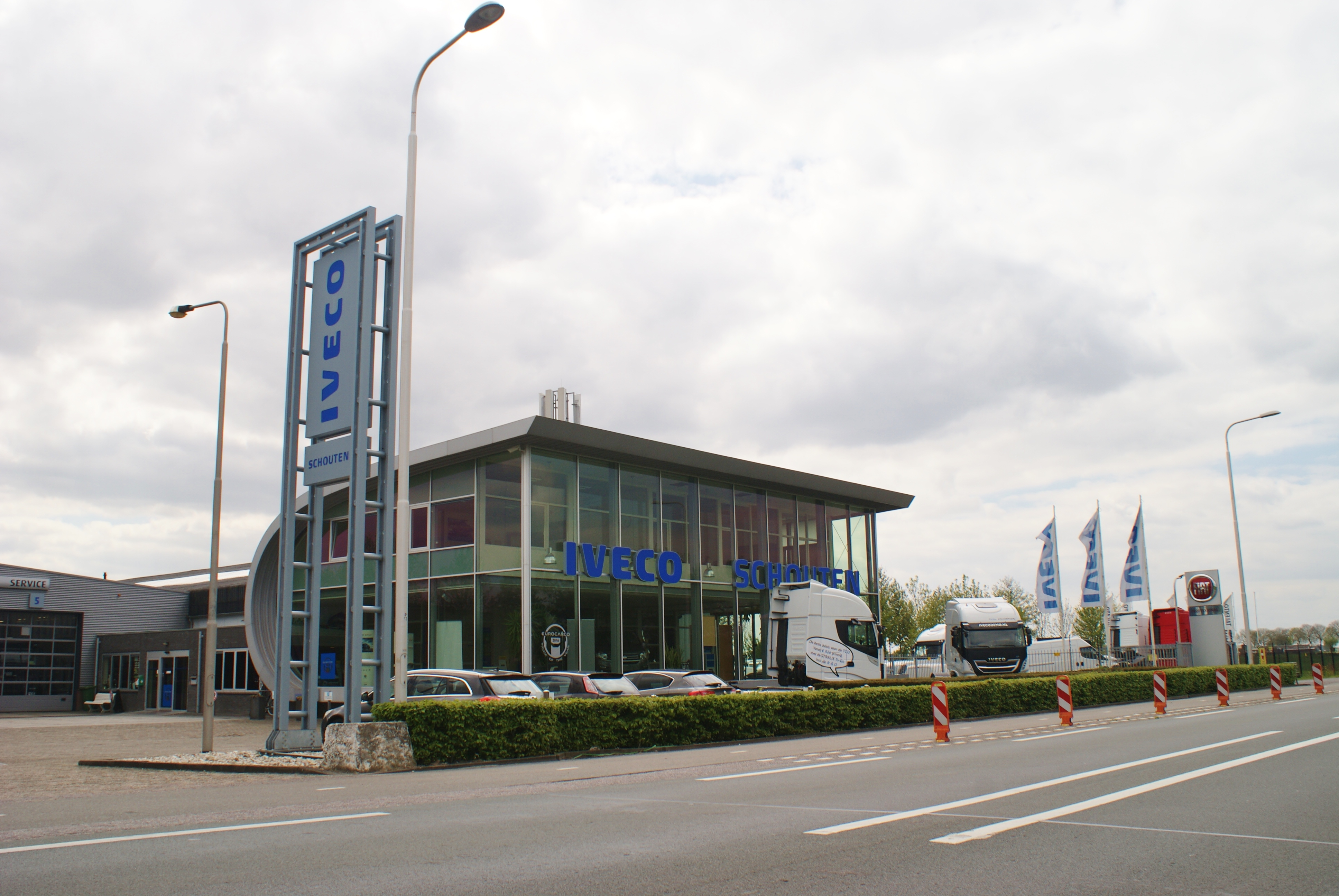 IVECO Dealer in Nederland met een IVECO Stralis voor het dealerpand.